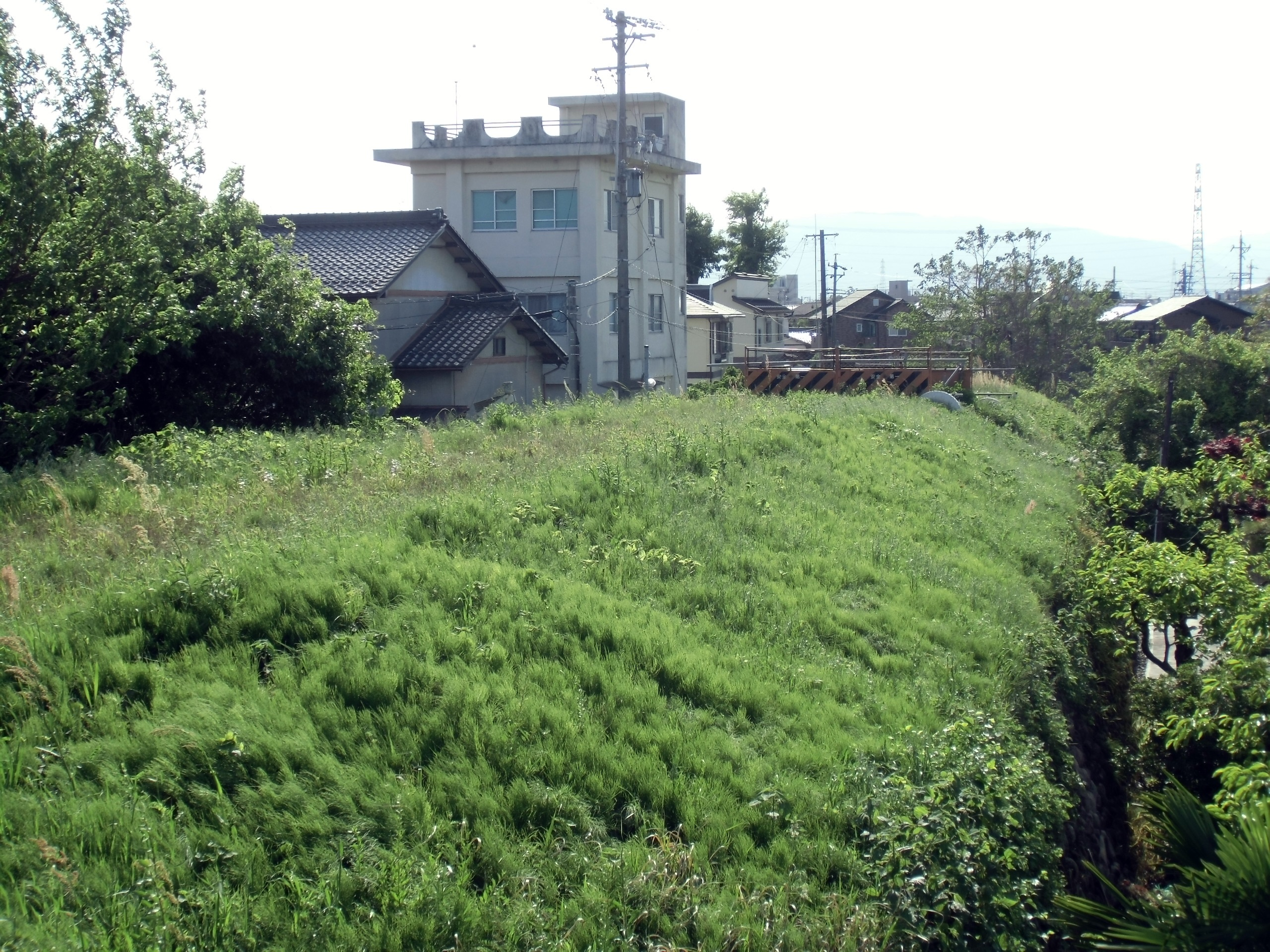 旧尻毛橋駅付近の土手